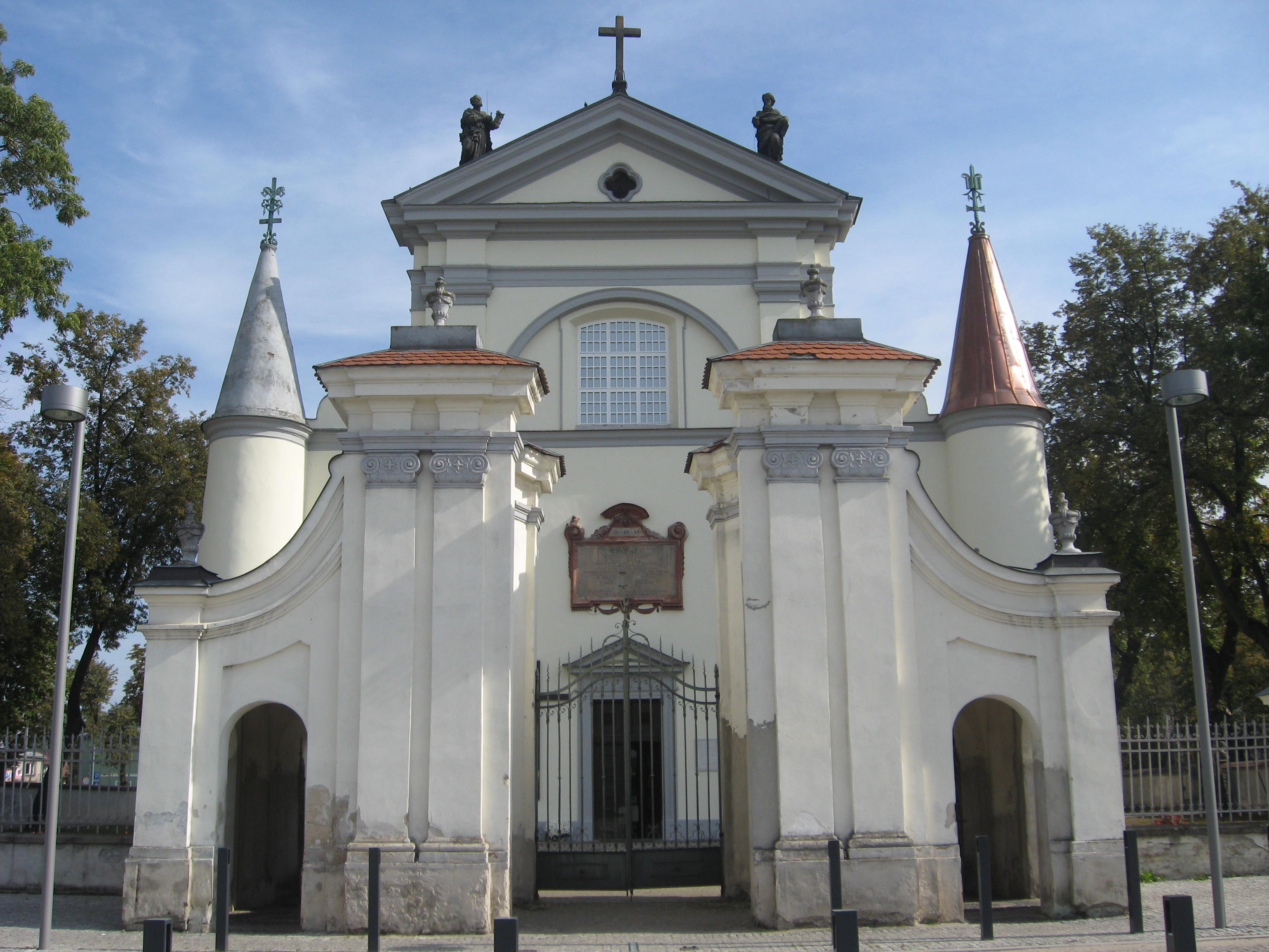 zespół kościoła par. p.w. Wniebowzięcia NMP i śś. Piotra i Pawła, Rynek, Węgrów, XVI-XVIII: kościół 2 dzwonnice brama ogrodzenie z bramką